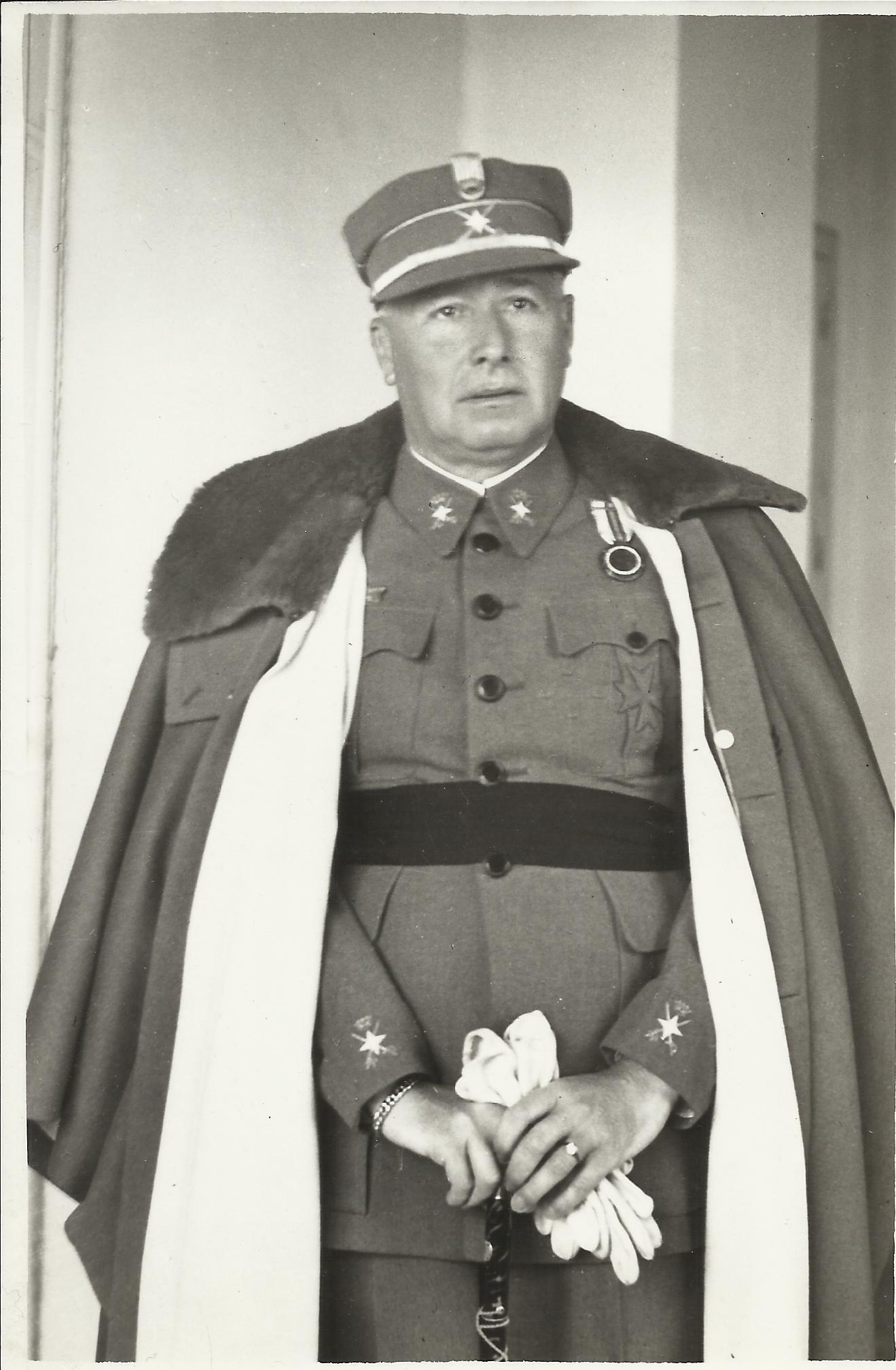 Foto de mi abuelo, General Ricardo de Rada, realizada por mi padre y propiedad mia, ya que mi padre ya fallecio.